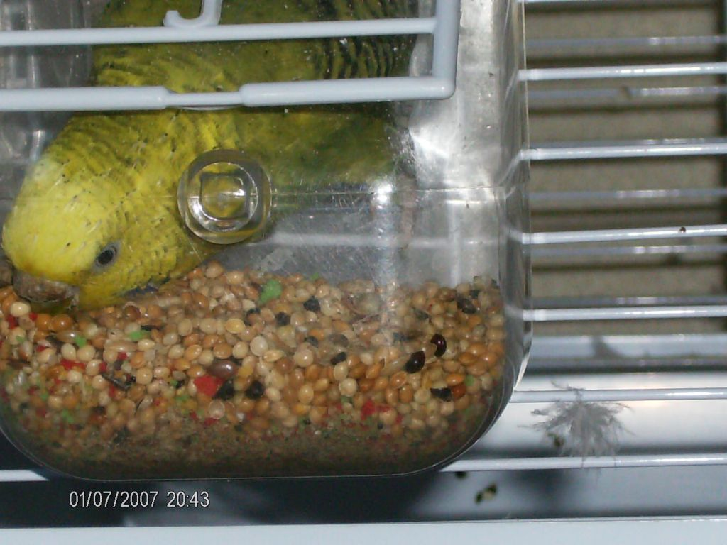 Licensieinfo: Foto zelf gemaakt, Naamsvermelding verplicht. Naamsvermelding als u het wilt kopieren: Calvintijd als naamsvermelding. Beschrijving: Grasparkiet Sweety eet wat voedsel uit zijn voedselbakje